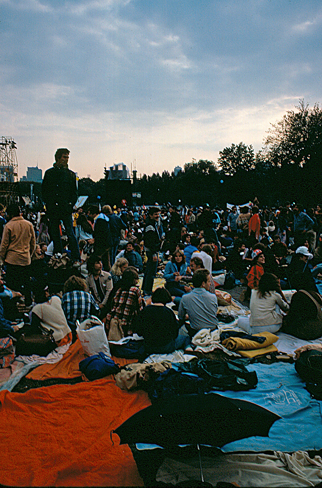 The Concert in Central Park , Paul Simon und Art Garfunkel